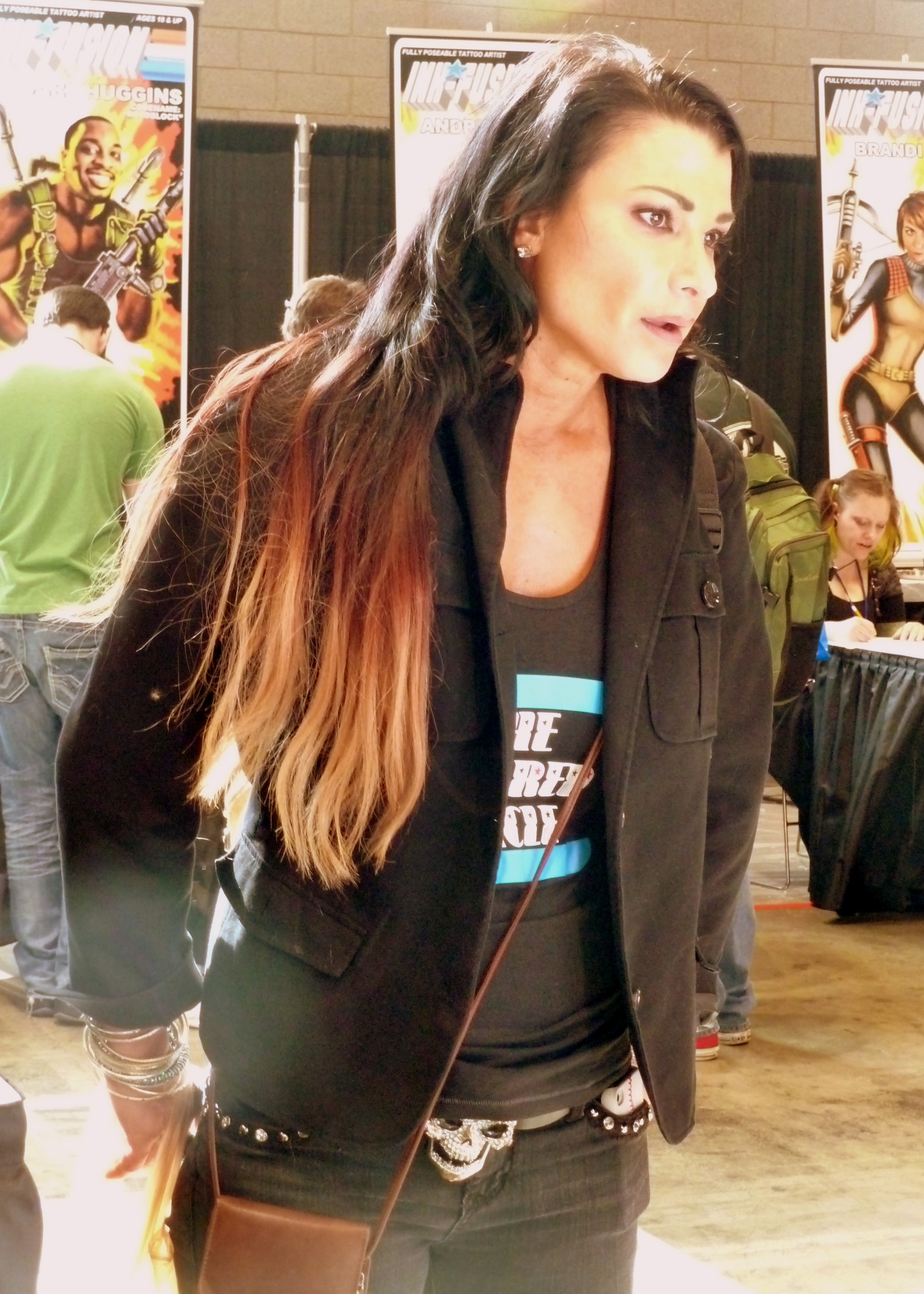 Lisa Marie Varon (Tara / Victoria) Chicago Comic & Entertainment Expo 2013